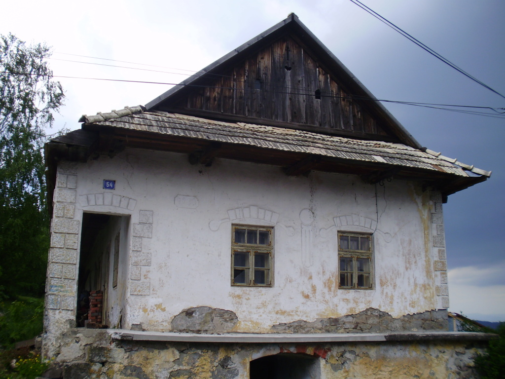 Starý dom